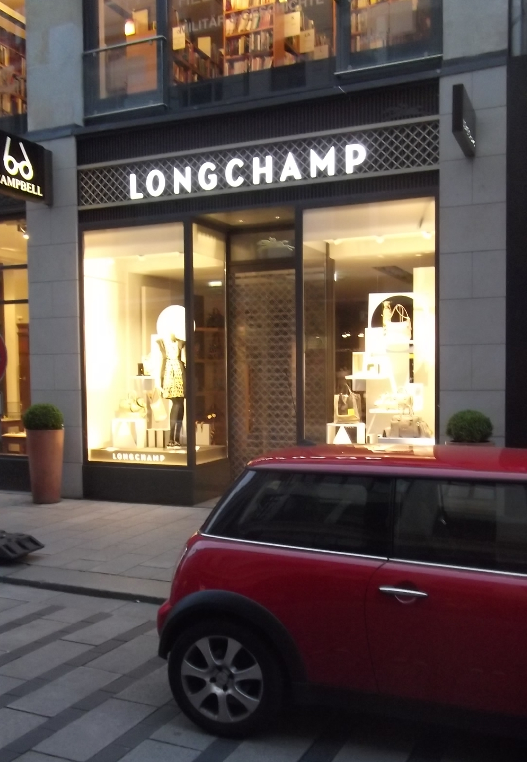 Hamburg, Neuer Wall